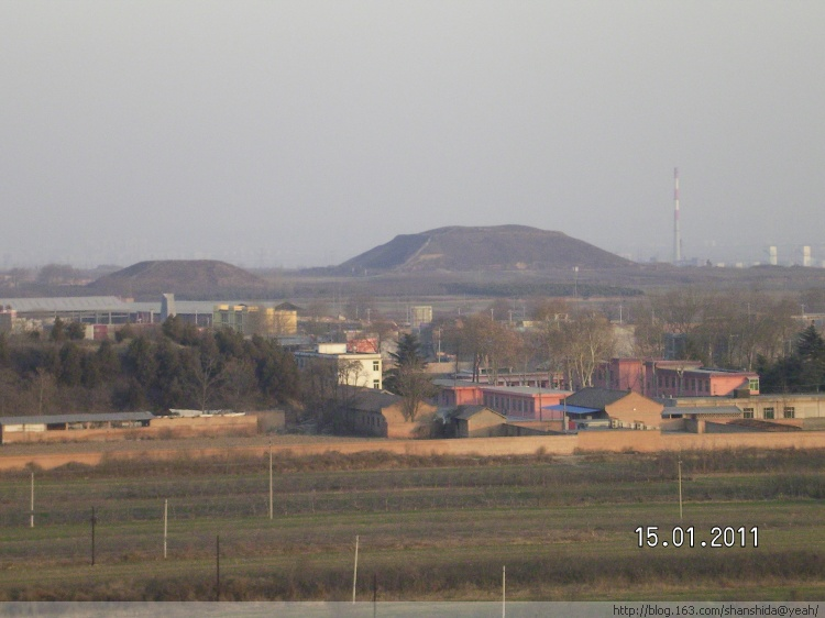 此图摄于2011年1月，图中两座一大一小的封土分别埋葬着汉元帝和其皇后